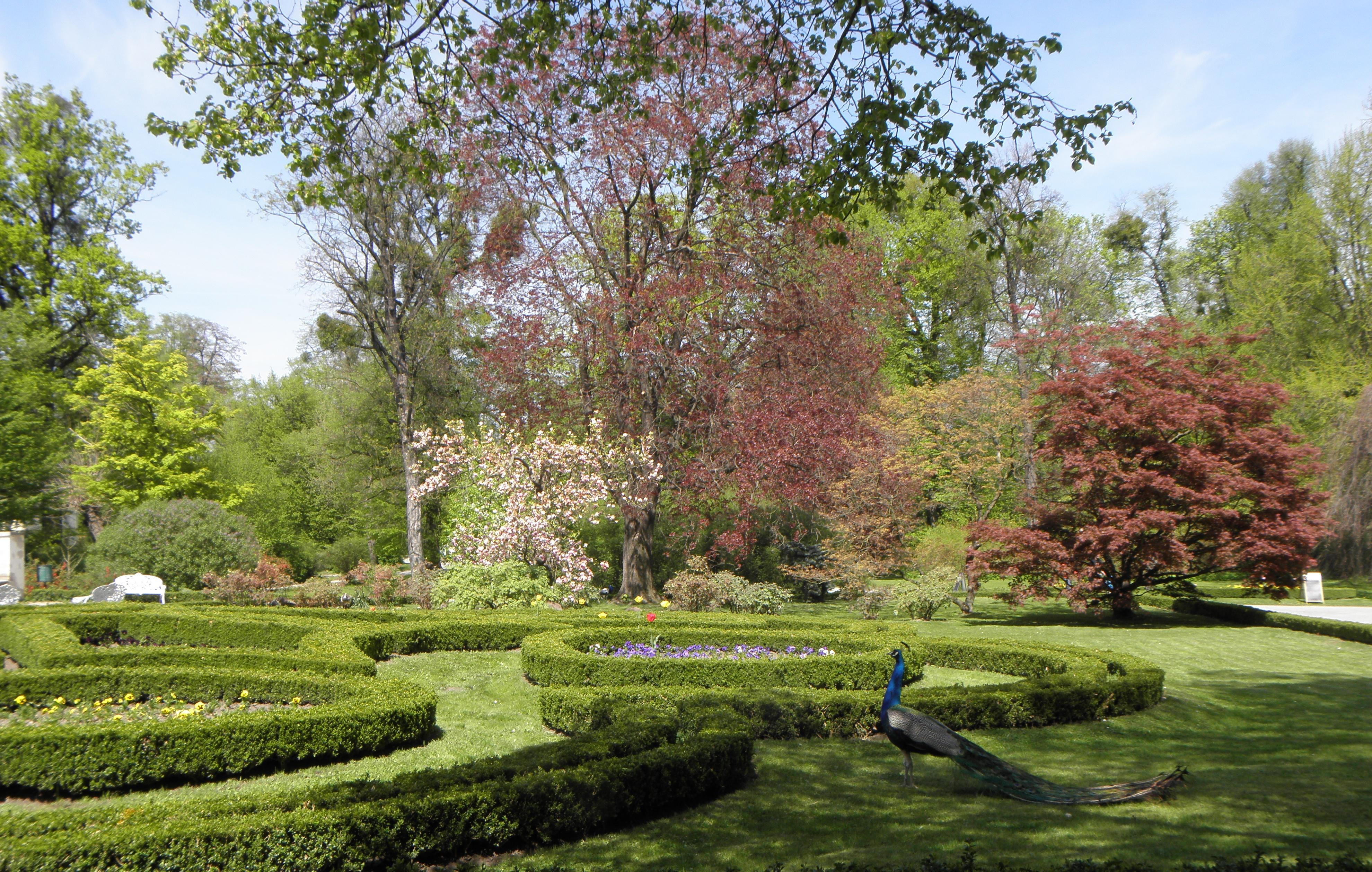 Česky: Arcibiskupský palác v Kroměříži, Podzámecká zahrada